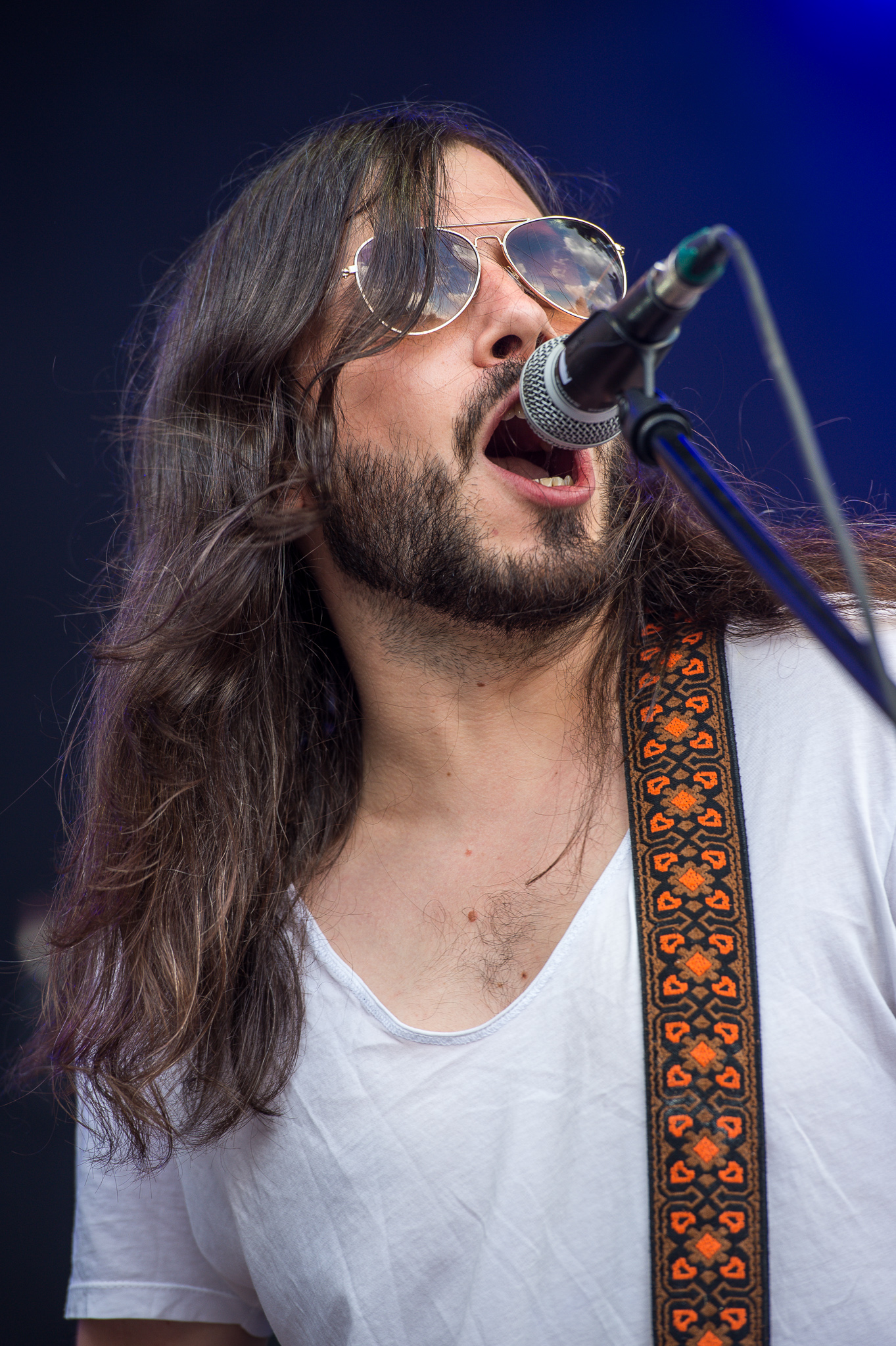 Concertbüro Franken,Festival,Konzert,Lieder am See,Livekonzert,Livemusik,Marcus Bonfanti,Musik,Ten Years After